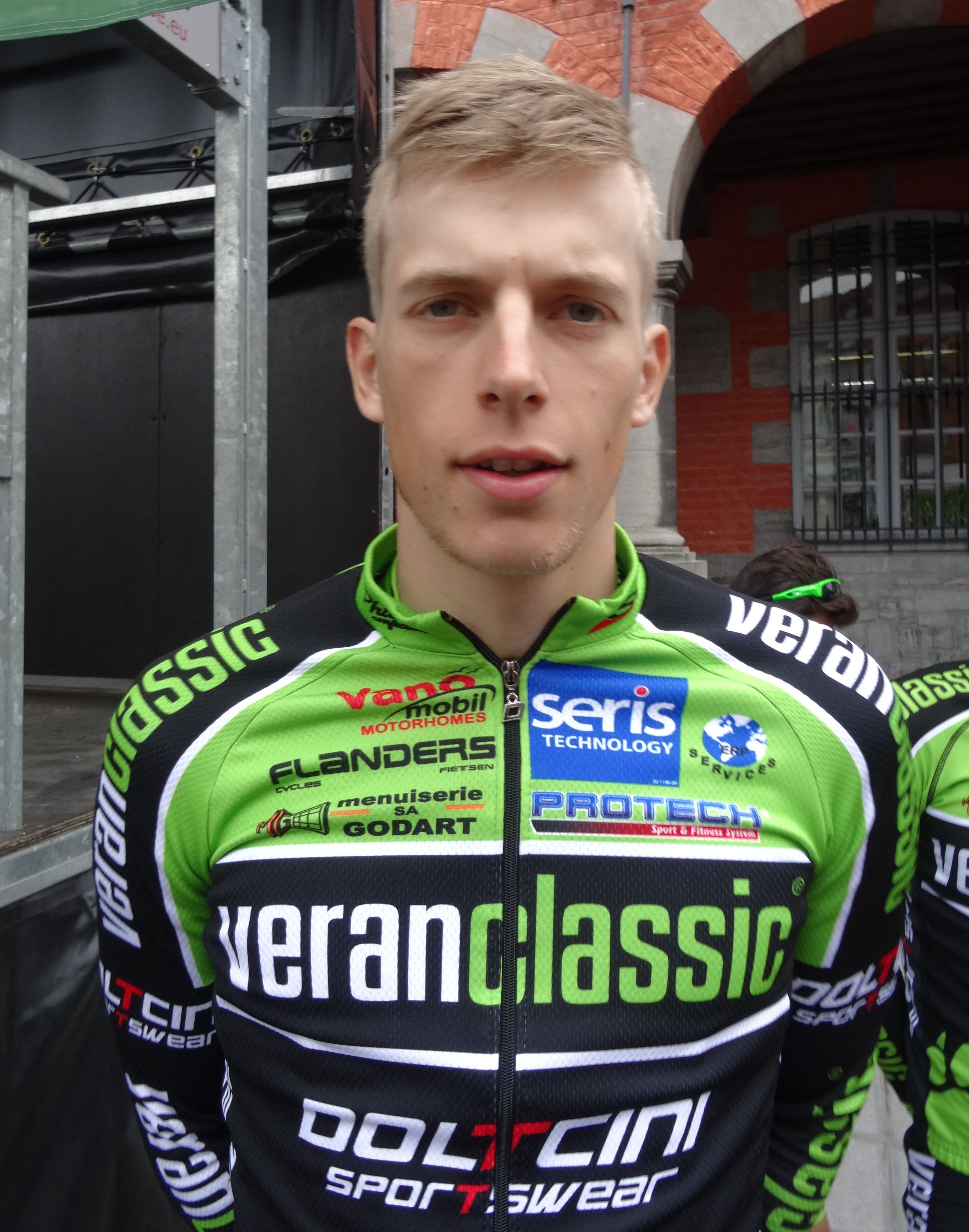 Triptyque des Monts et Châteaux 2014, étape 1, 4 avril 2014, départ d'Antoing. Depicted person: Rick Ottema Depicted team: Veranclassic-Doltcini The creation of these files was made possible thanks to the organizers of the Triptyque des Monts et Châteaux 2014 English | français | +/−